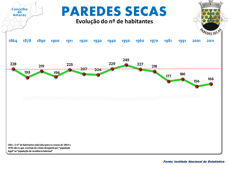 Censo 2011